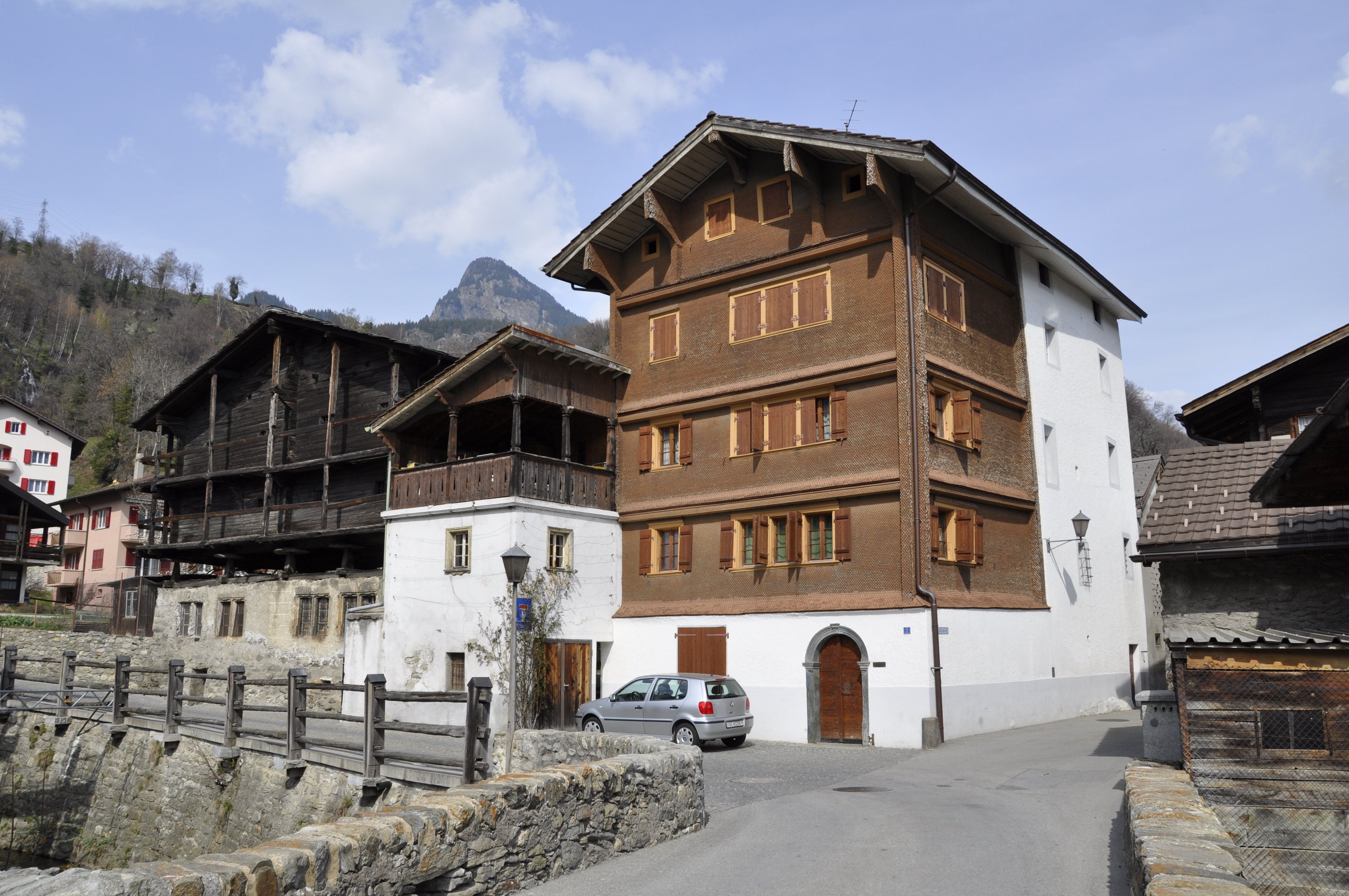 Spycher Michel Supersaxo, Naters